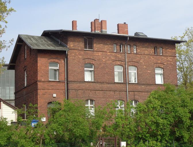 Baudenkmal Berlin-Schöneberg Werdauer Weg 2